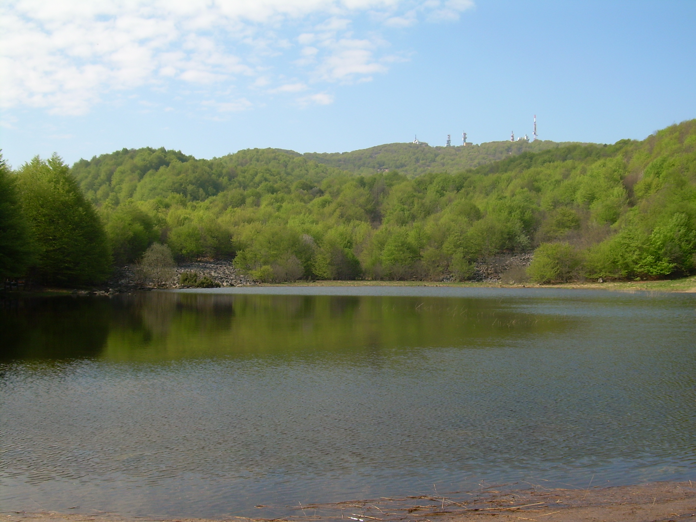 Il Laione in stato di lago. Di solito è una torbiera, ma dopo forti piogge la conca si allaga.